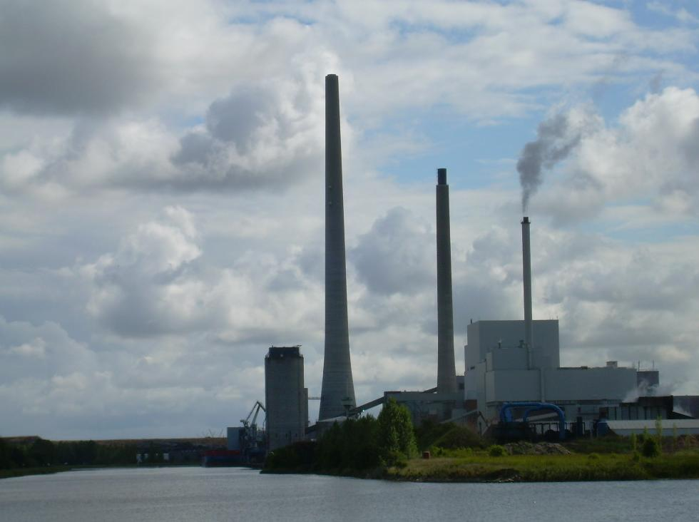 Power plant in Odense, Denmark (Fynsværket)